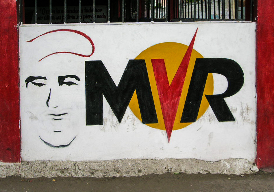 Logotipo del MVR pintado en una casa de ese partido en Barcelona.